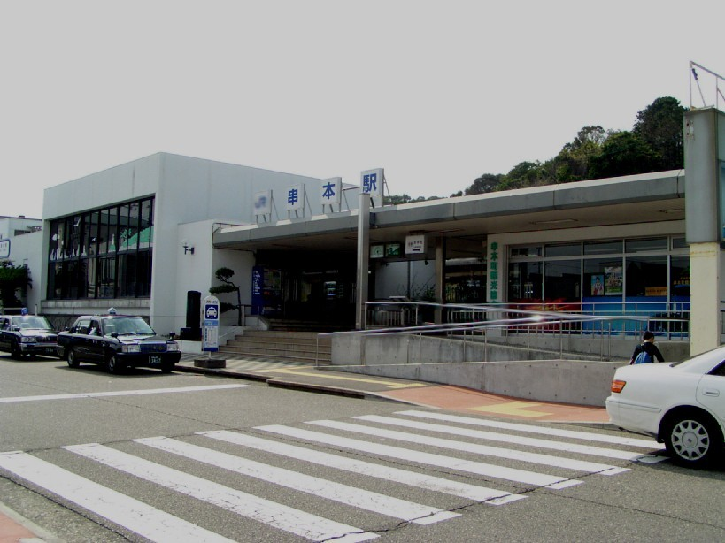 2005/04/03に投稿者が串本駅にて撮影。